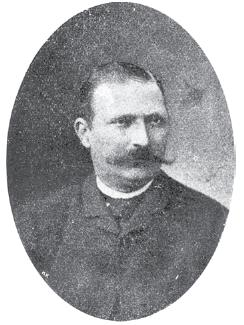 Хаджи Георги Иванов от село Волак, Драмско.